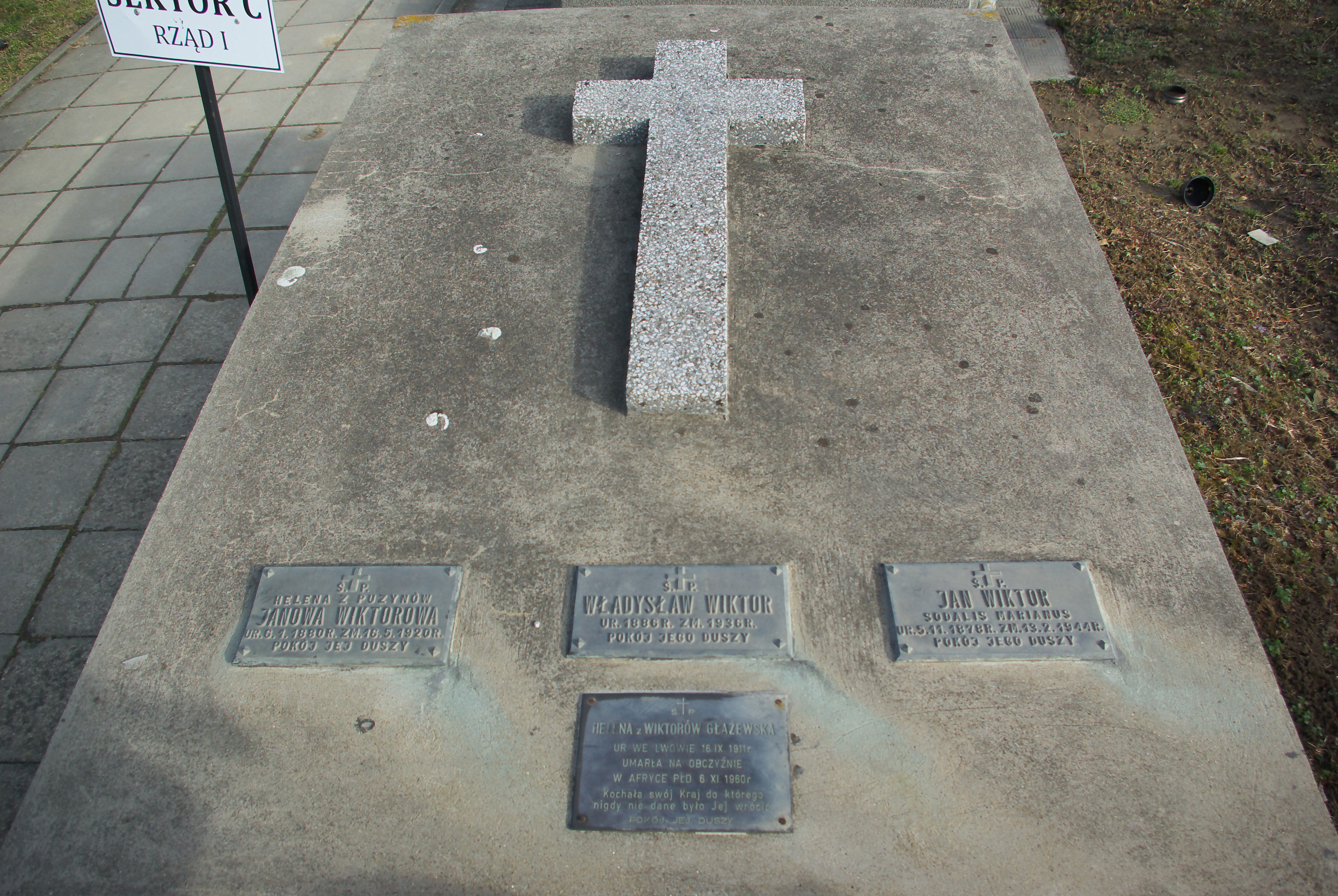 Grobowiec Heleny, Władysława, Jana, Heleny Wiktorów na cmentarzu w Zarszynie.